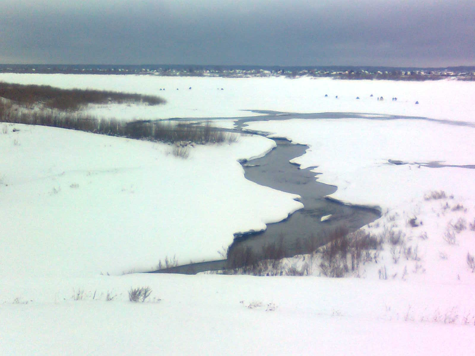 Ушайка даже в холодные зимы не замерзает.